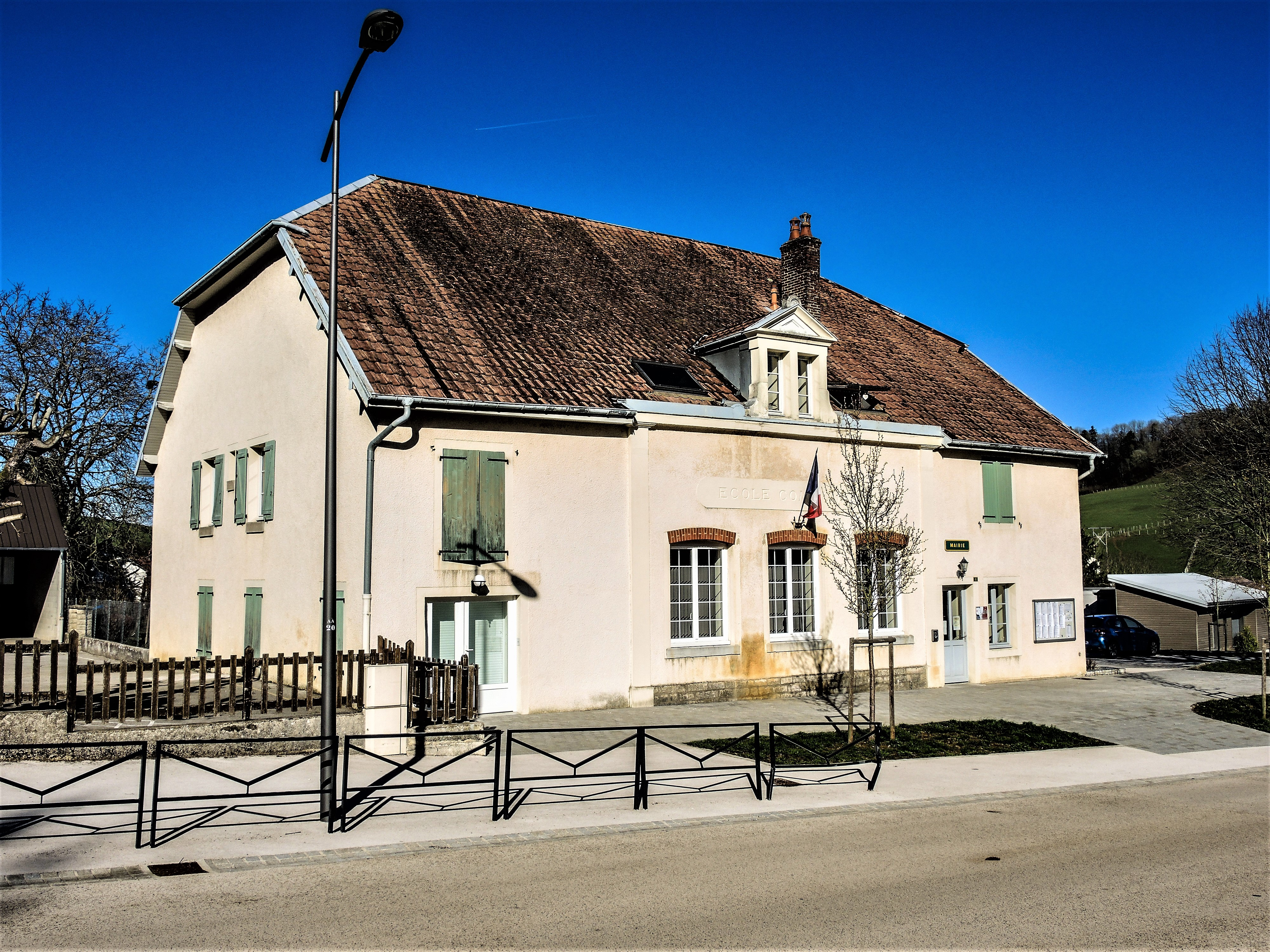 Mairie de Pugey